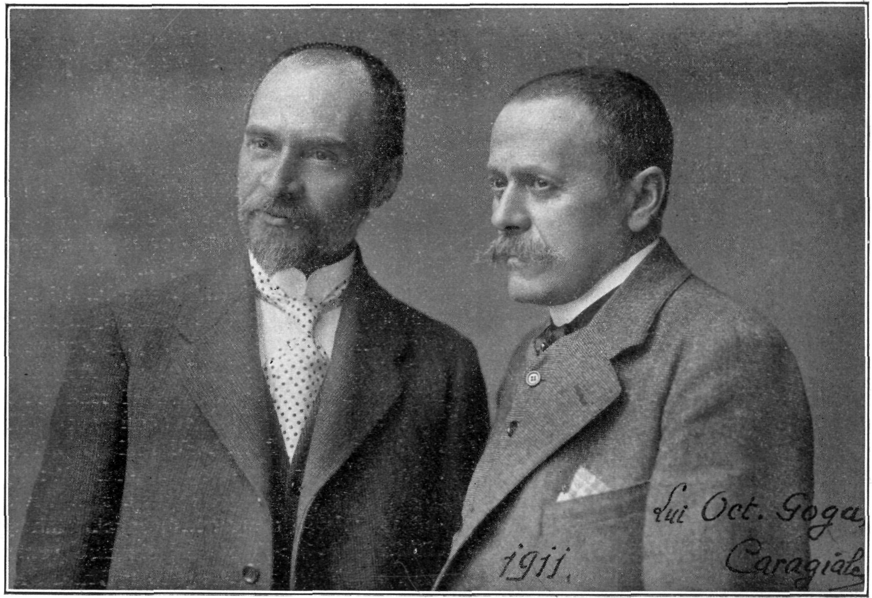 George Coșbuc și Il Caragiale. Fotografie cu dedicație scrisă de Caragiale pentru Octavian Goga